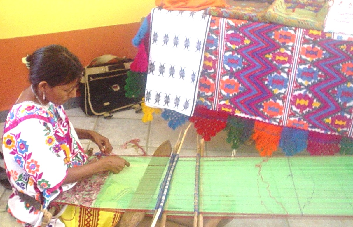 Trabajo en Telar de cintura, son los atractivos del Pueblo de Can'oon- Zacoalpan los maravillosos arte Amuzga.